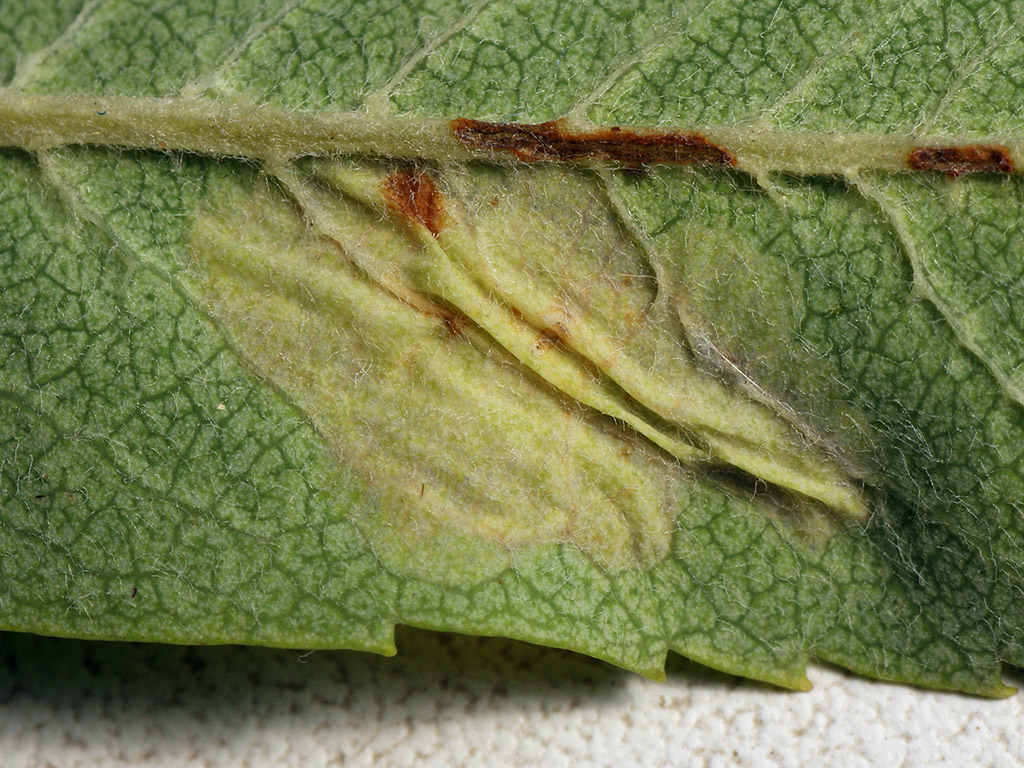 Exemplar found: Russia, Moscow Oblast, Orekhovo-Zuyevsky District, near settlement Topoliny, 18.07.2017, on rowan (Sorbus aucuparia) leaf, days МО, Орехово-Зуевский р-н, окрестности посёлка Тополиный, 18.07.2017, на листьях рябины обыкновенной, днём